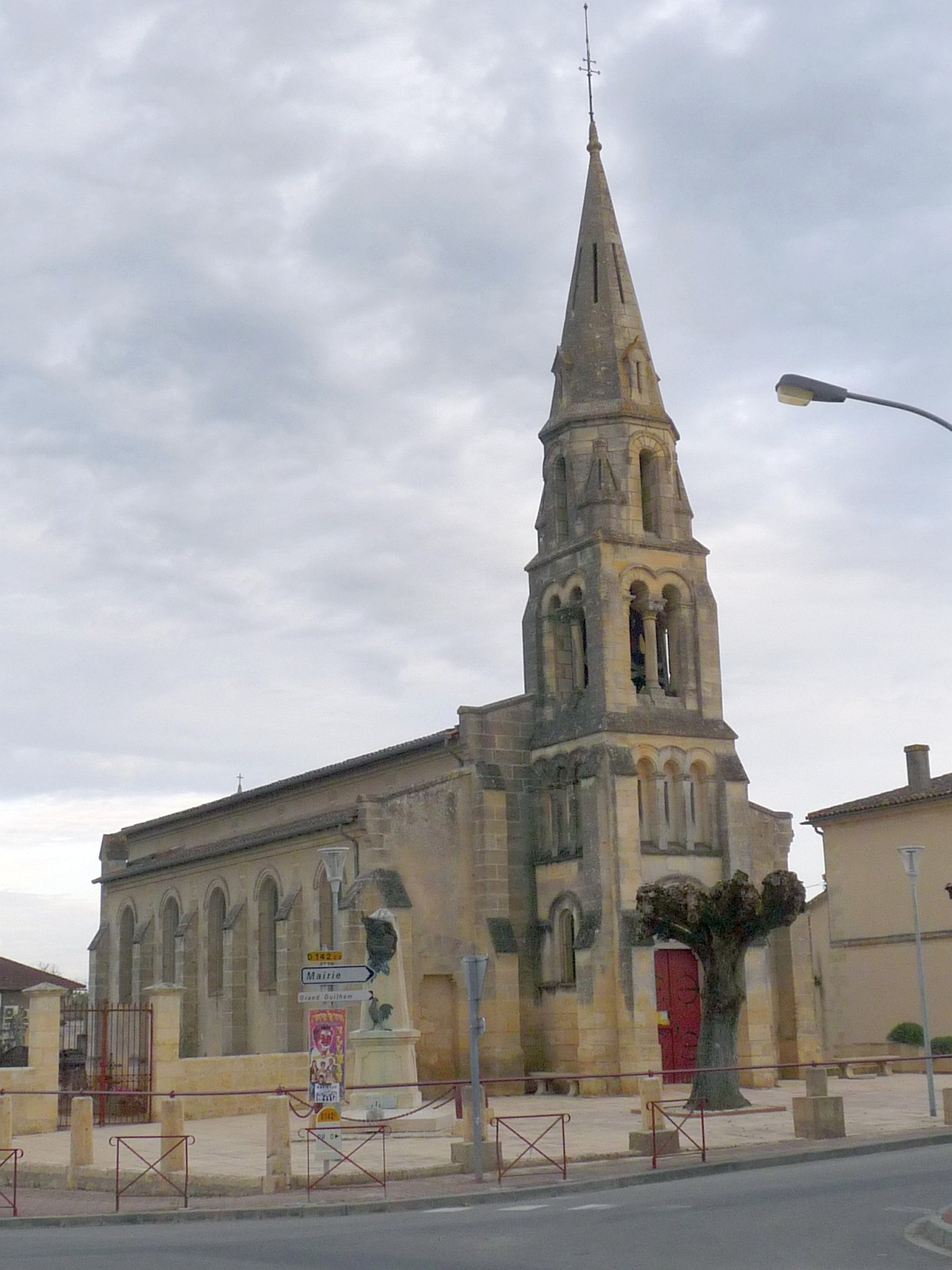 Eglise de Marsas, Gironde, France